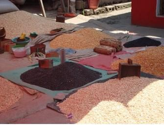 principales cultivos de San Isidro